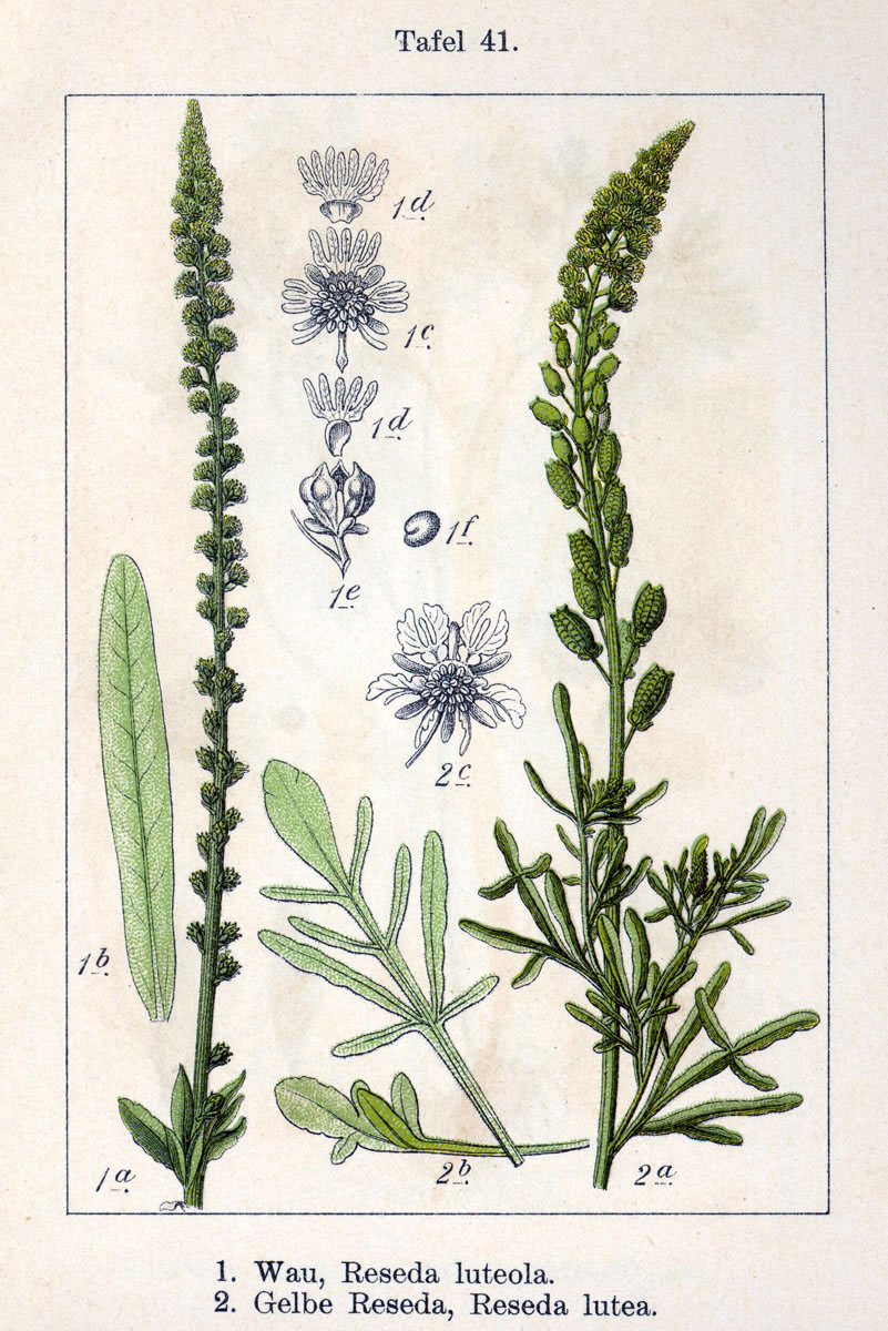 1. Reseda luteola L., 2. Reseda lutea L. Original Description 1. Wau, Reseda luteola 2. Gelbe Reseda, Reseda lutea